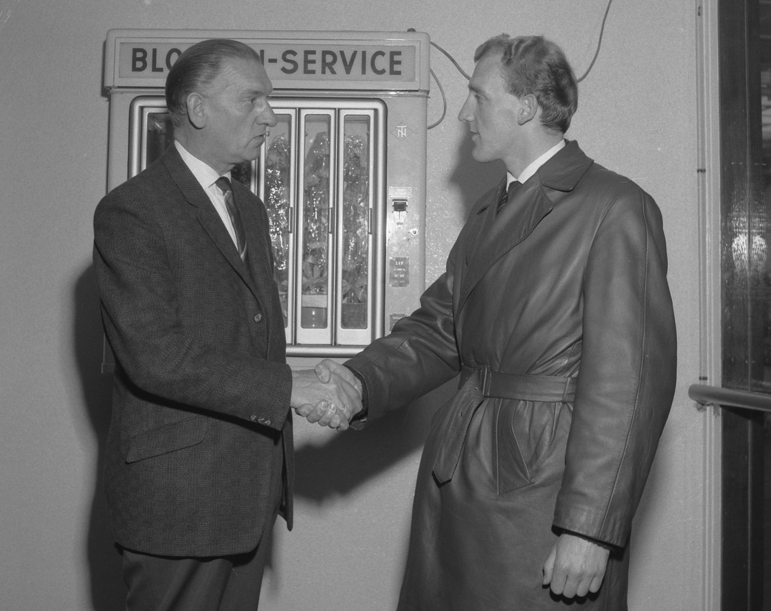 Vertrek van doelman van Blauw-Wit. Rob van Heeswijk naar Australie, vader en zoon.